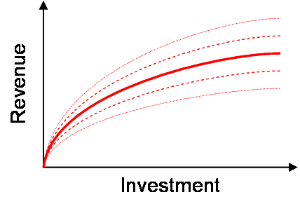 Revenue uncertainty